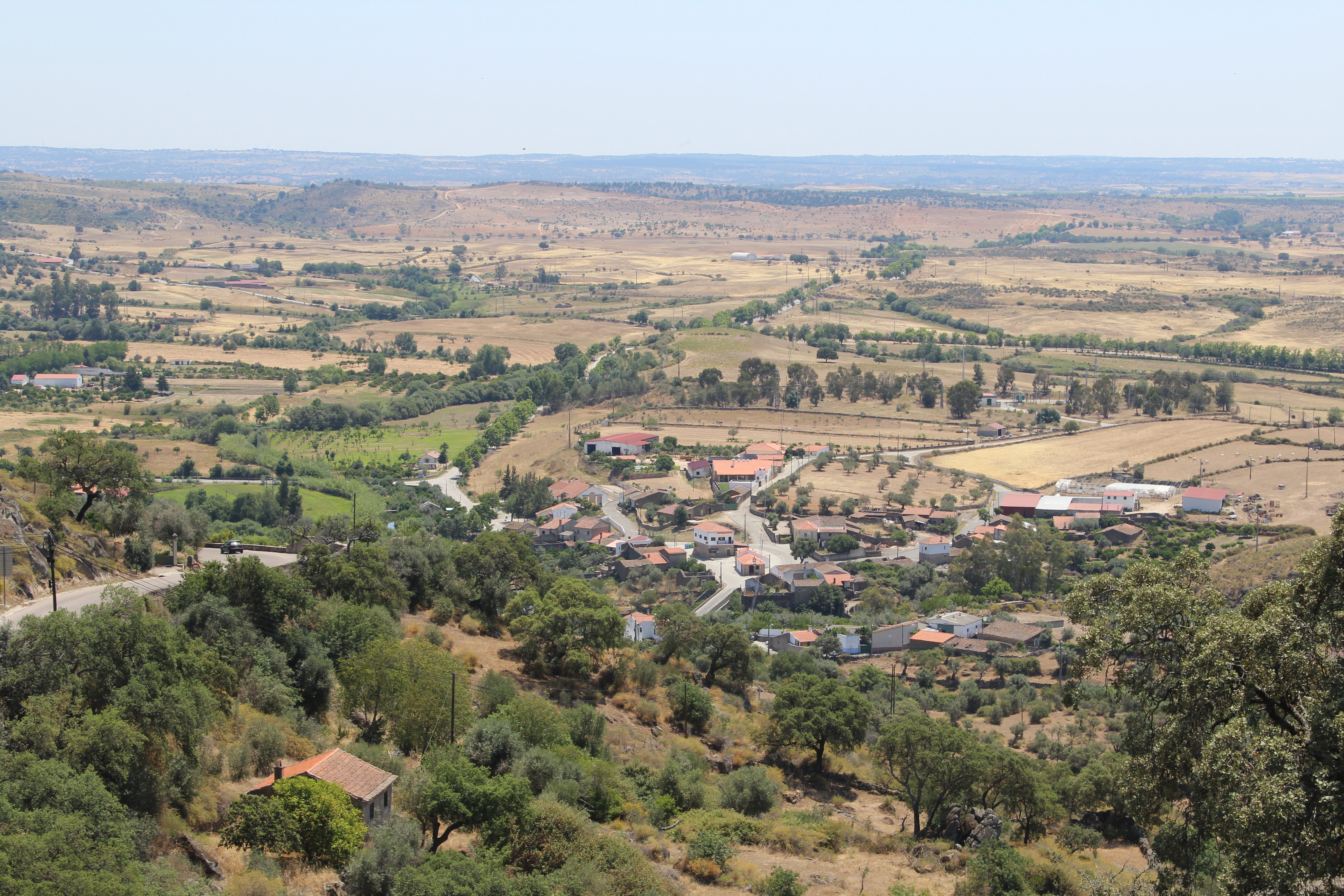 Freguesia de Idanha-a-Nova, em Portugal